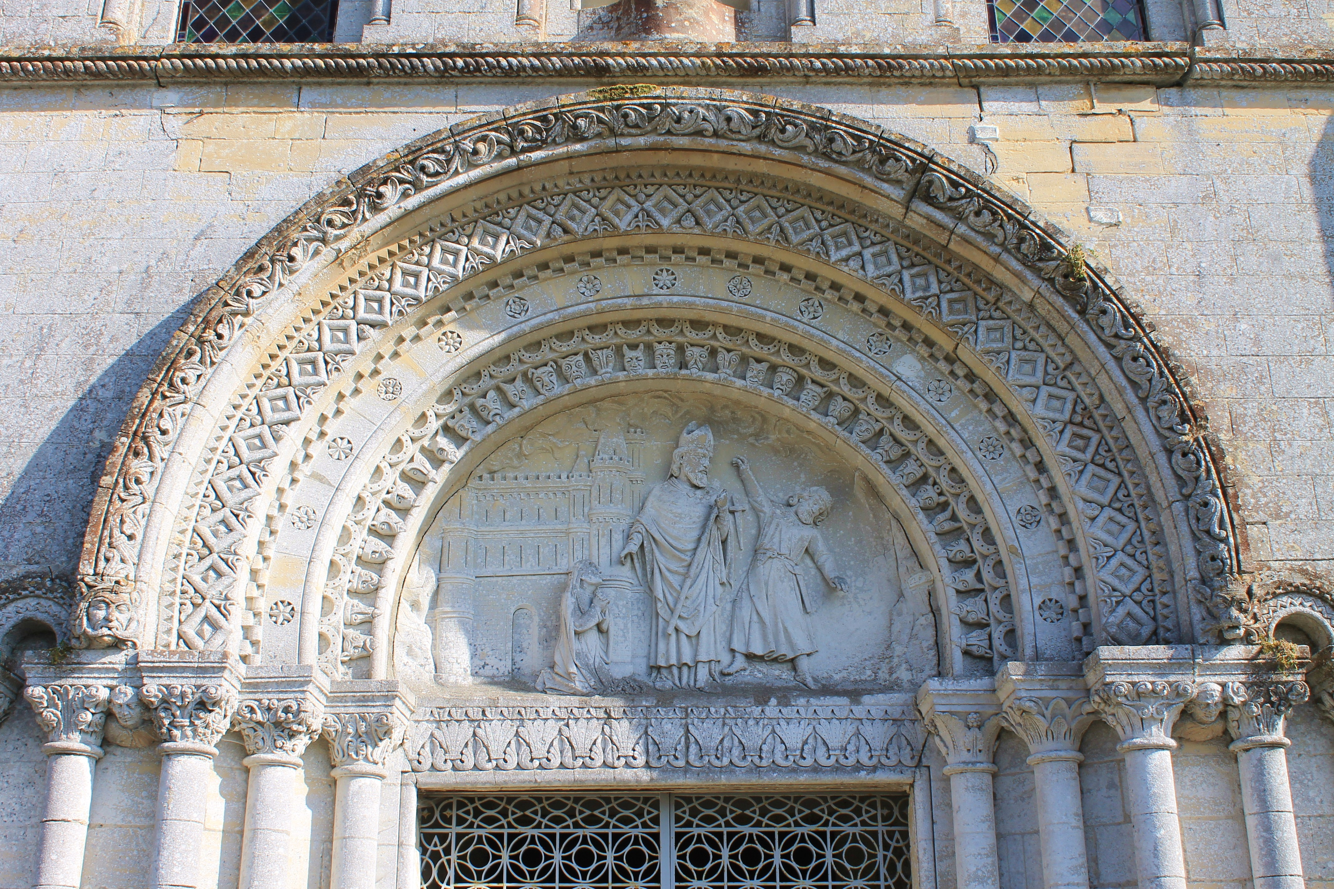 Portail occidental de l'église Saint-Aubin de Vaux-sur-Aure (Calvados). Saint-Aubin délivrant Ethéra, une vieille femme poursuivie par ses créanciers.